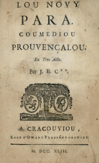 premiera pagina dau novi parat, 1743